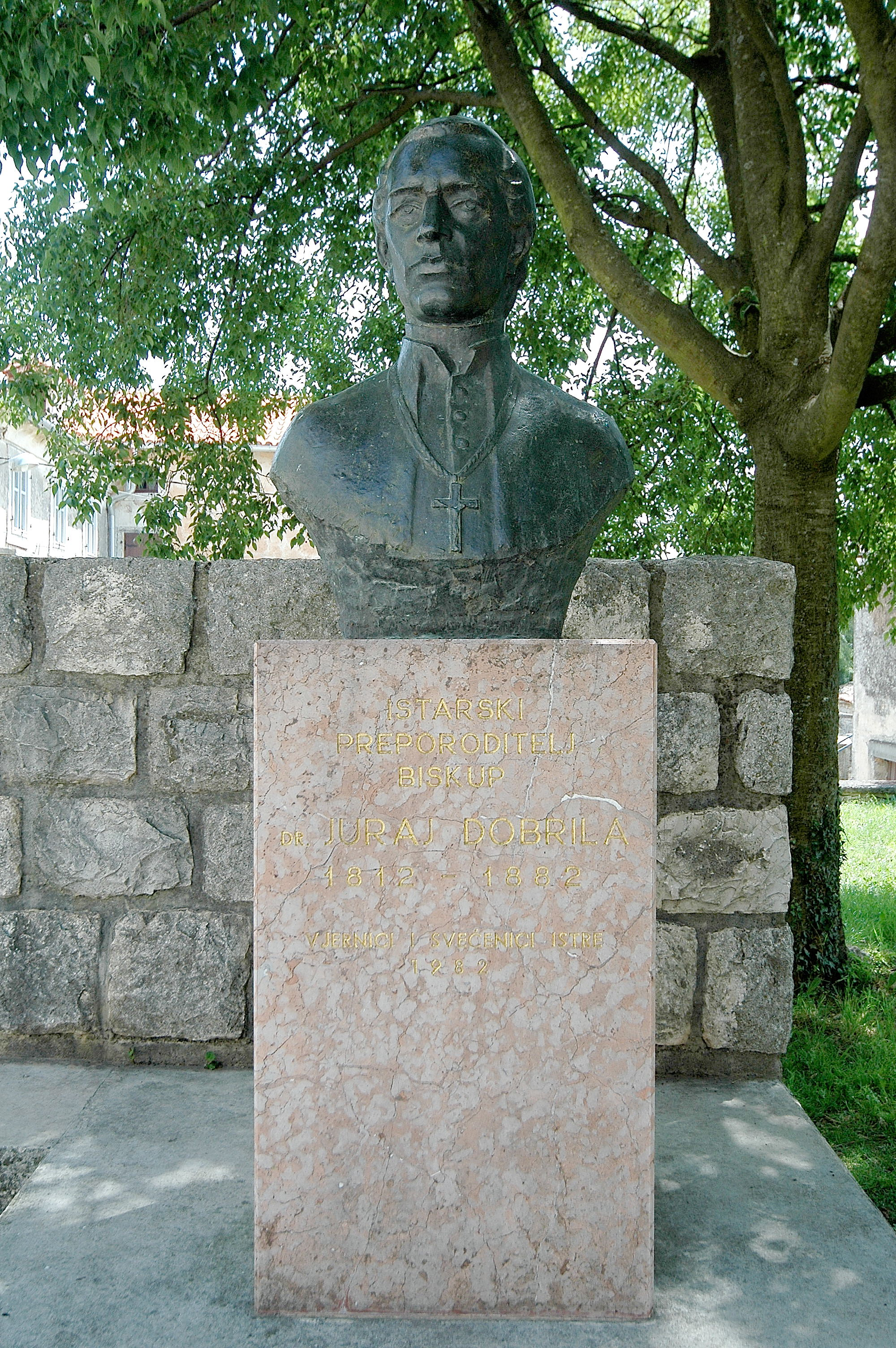 Dr. Juraj Dobrila-monument, Tinjan, Istria, Croatia